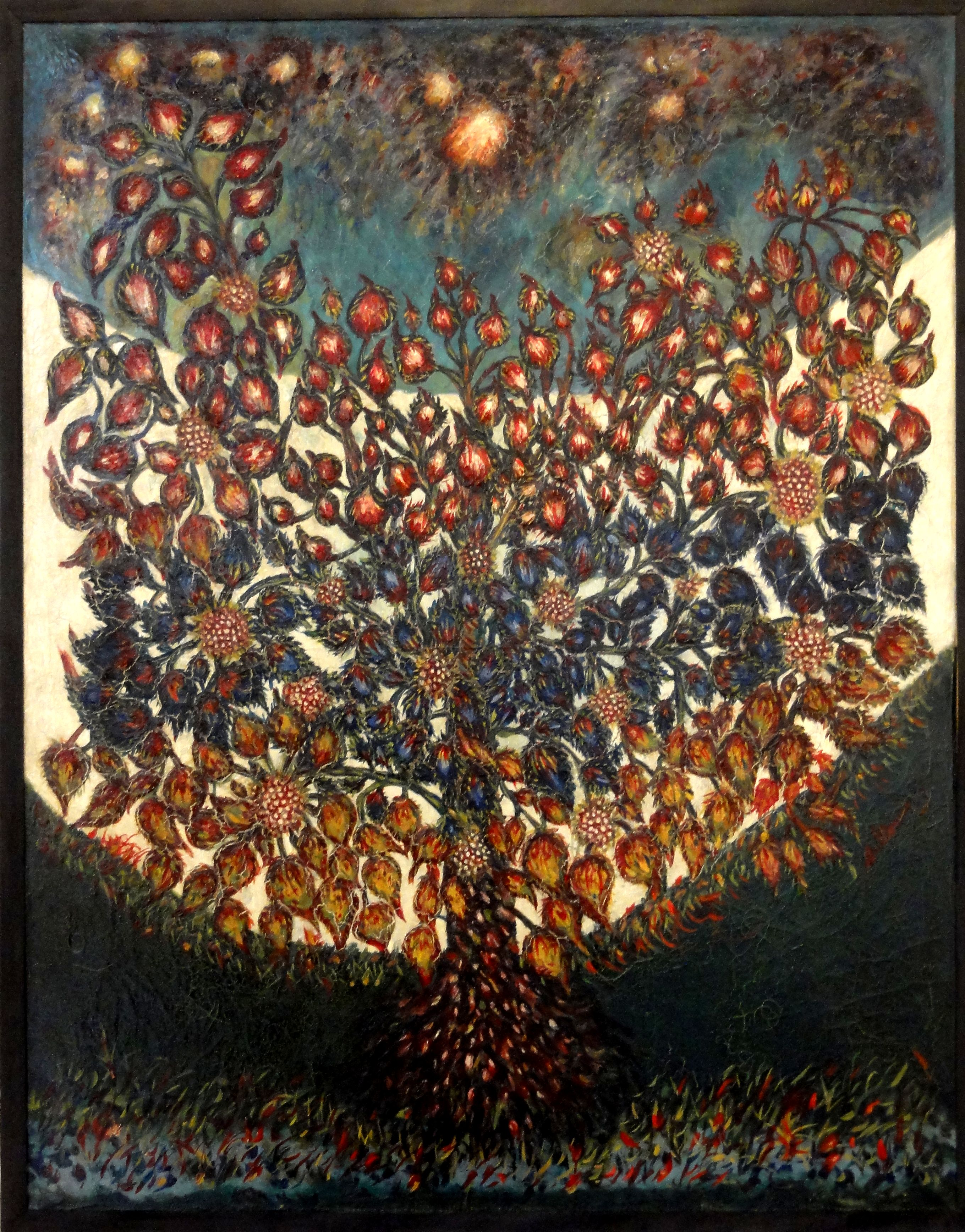 Séraphine Louis, L'arbre de vie, 1928, Ripolin sur toile.